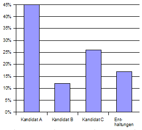 Graph. Darstellung einfacher Mehrheit